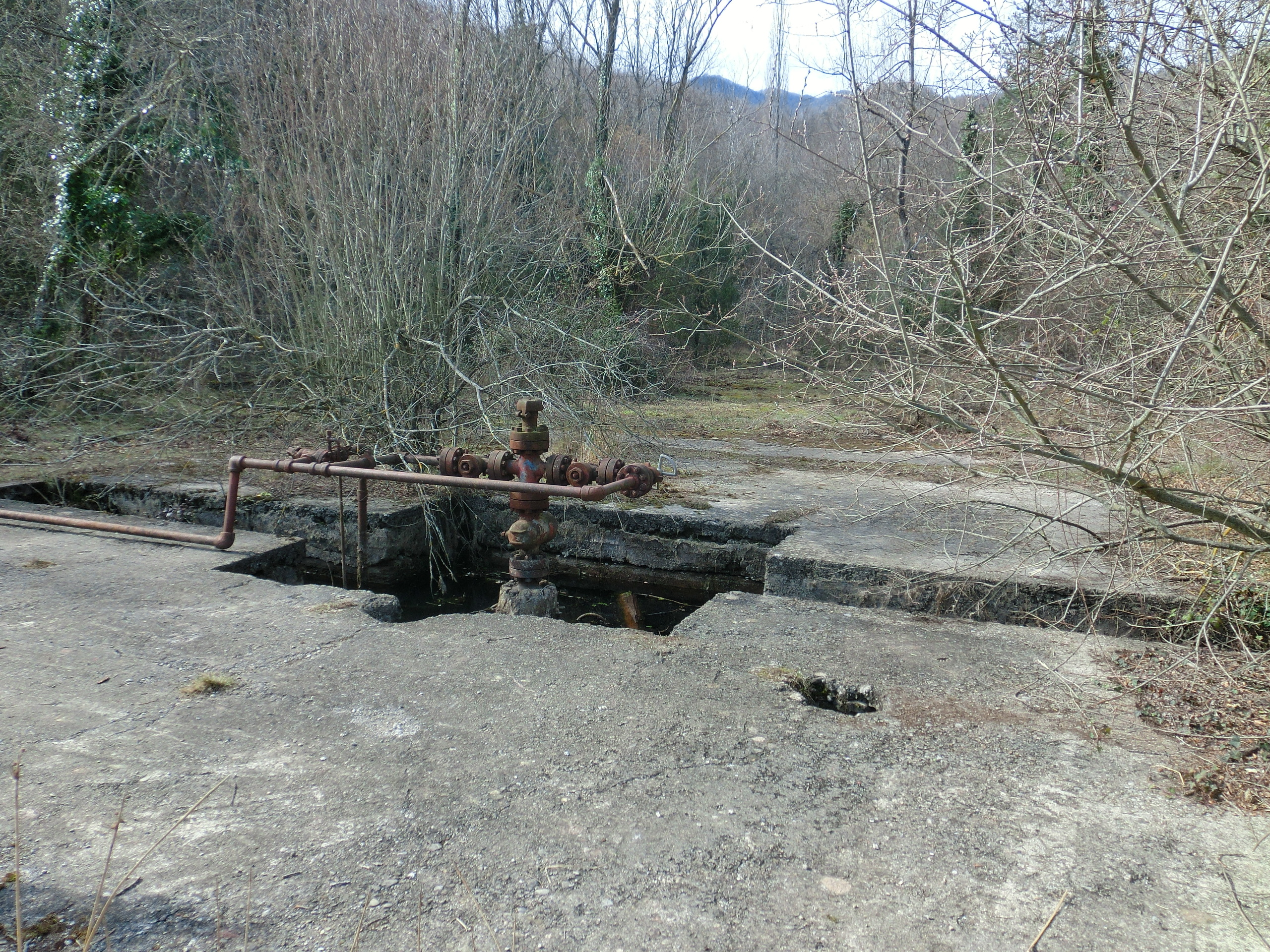 Riudaura 1 es un antic pou de petroli obert al 1960 per a la recerca d'hidrocarburs no convencionals per part de les companyies Ciepsa i Cepesa on van trobar gas de tipus C1 al C6 –metà, propà, butà...–, tot i que el metà, CH4, és el que era més abundant. En aquest indret es on Teredo oil vol començar les prospeccions a la recerca de gasos no convencionals mitjançant la tècnica del fracking. (extret del web de la Plataforma RiudauraJunts contra el Fracking)